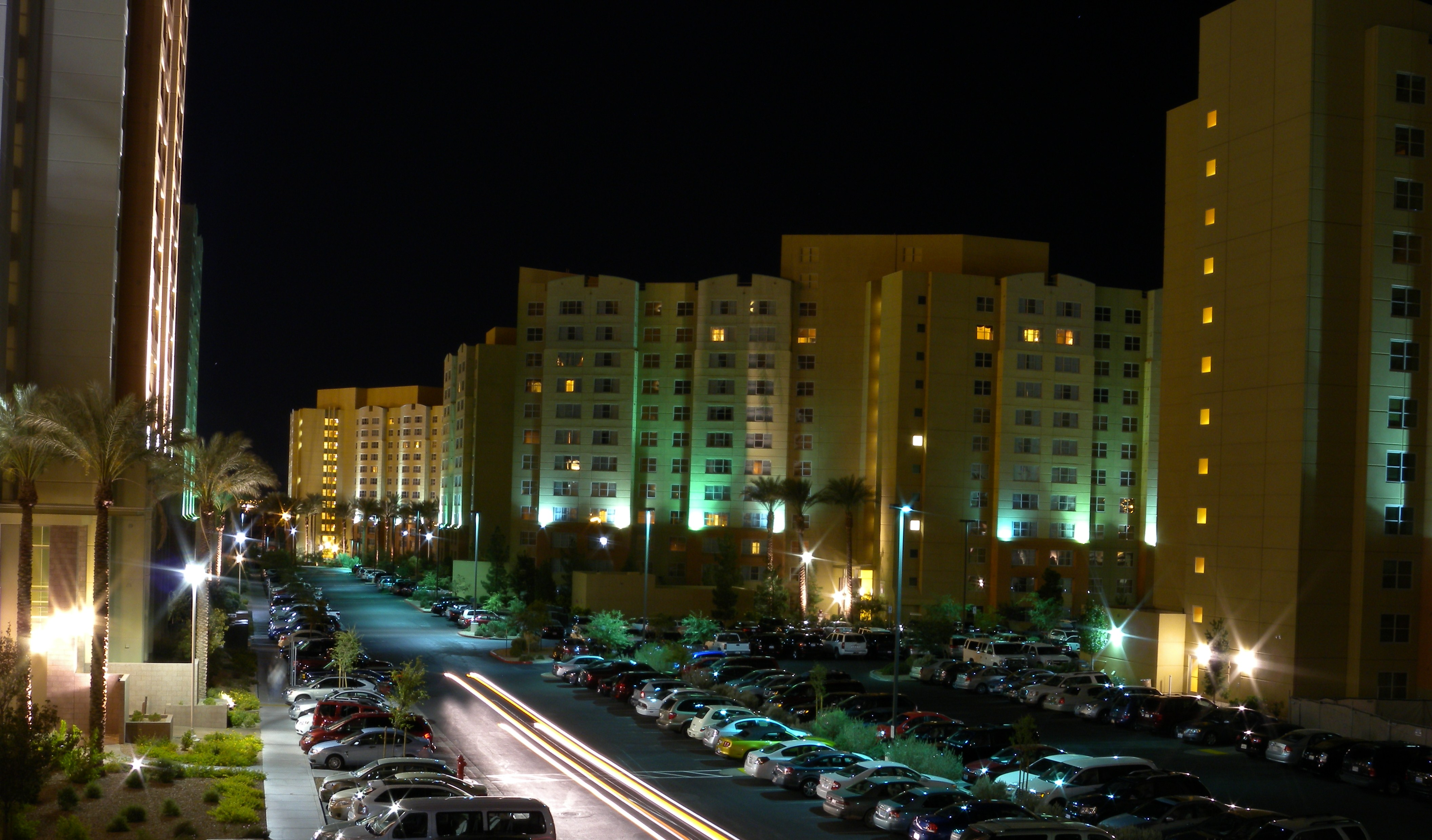 Grand View, Las Vegas